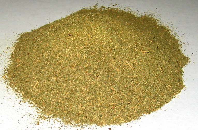 Typical powdered commercial Kratom, Mitragyna speciosa.